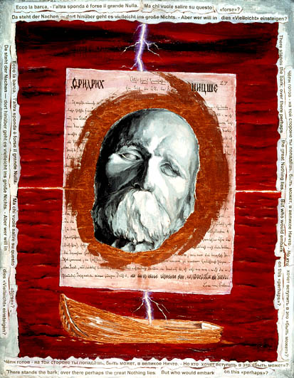 Nietzsche's Portrait. 39,5x50 cm. Oeltempera auf Holz.